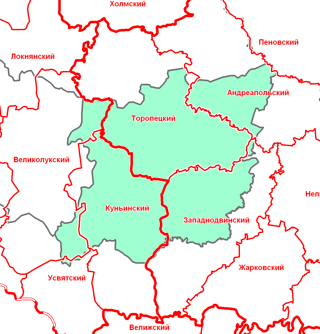 Торопецкий уезд Псковской губернии в современной сетке районов.